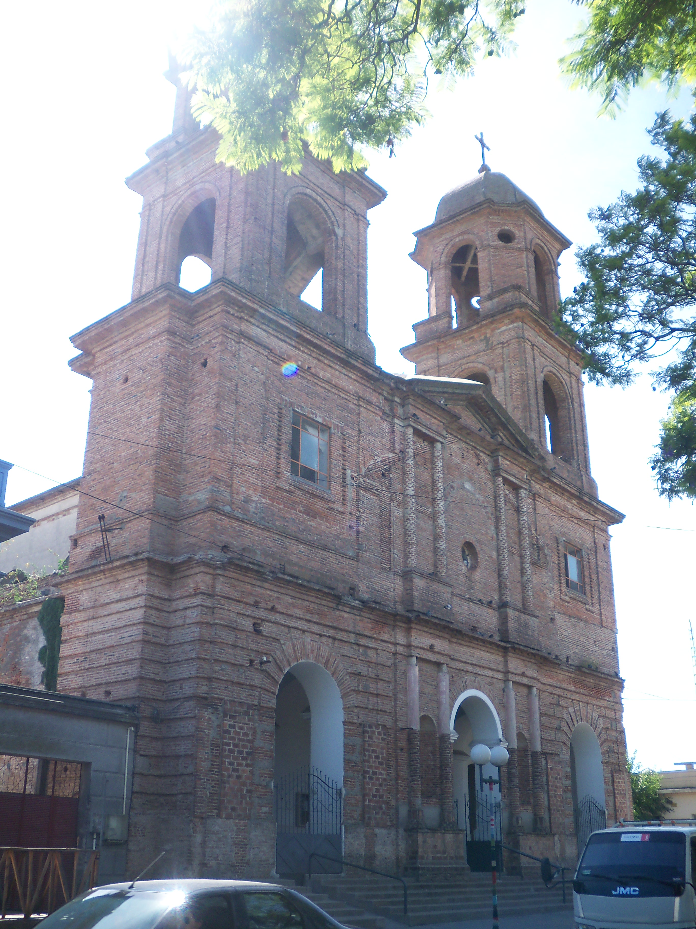 Iglesia de Nuestra Señora de los Dolores carp. Cat. 30. Ubicada en el departamento de Soriano